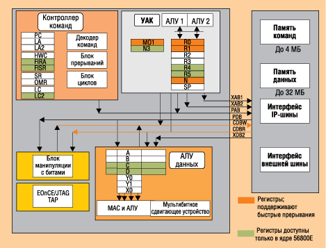 Ядро 56800Е цифровых сигнальных контроллеров 56F8xxx